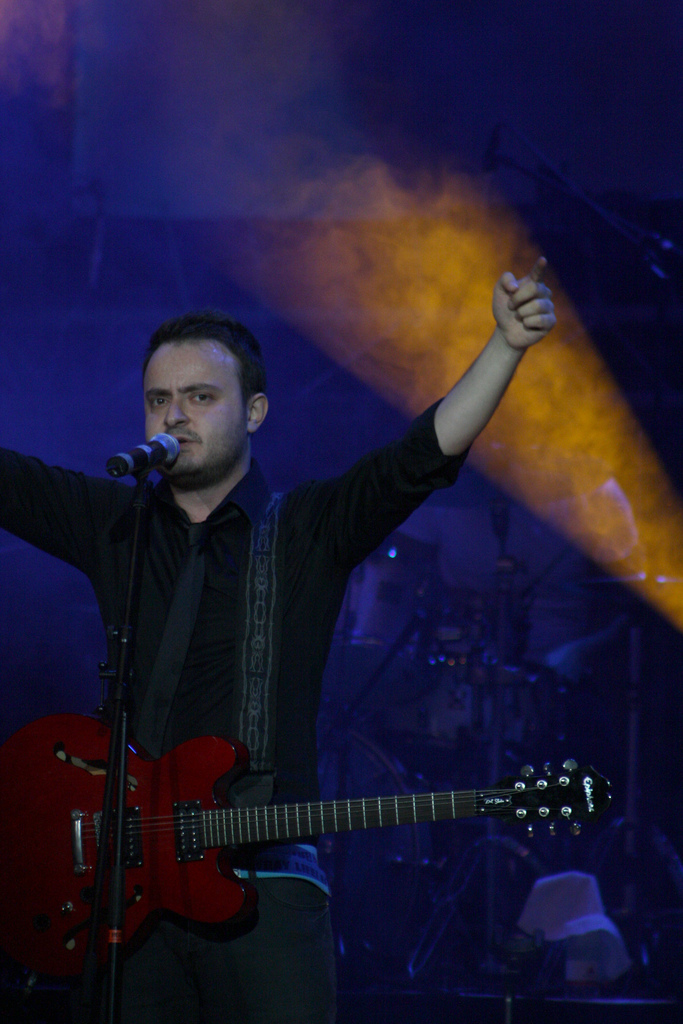 Grup 84 Konser